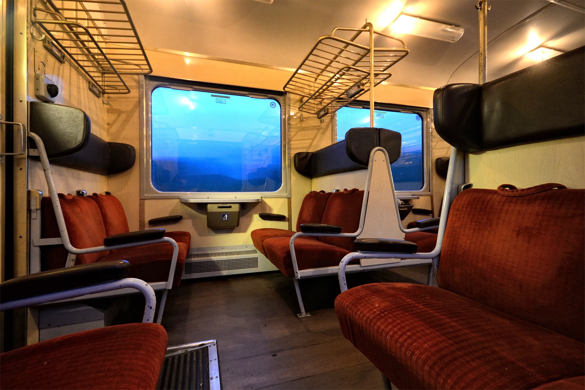 4er-Sitzgruppe mit Bremshey-Sitzen eines Schlierenwagens.